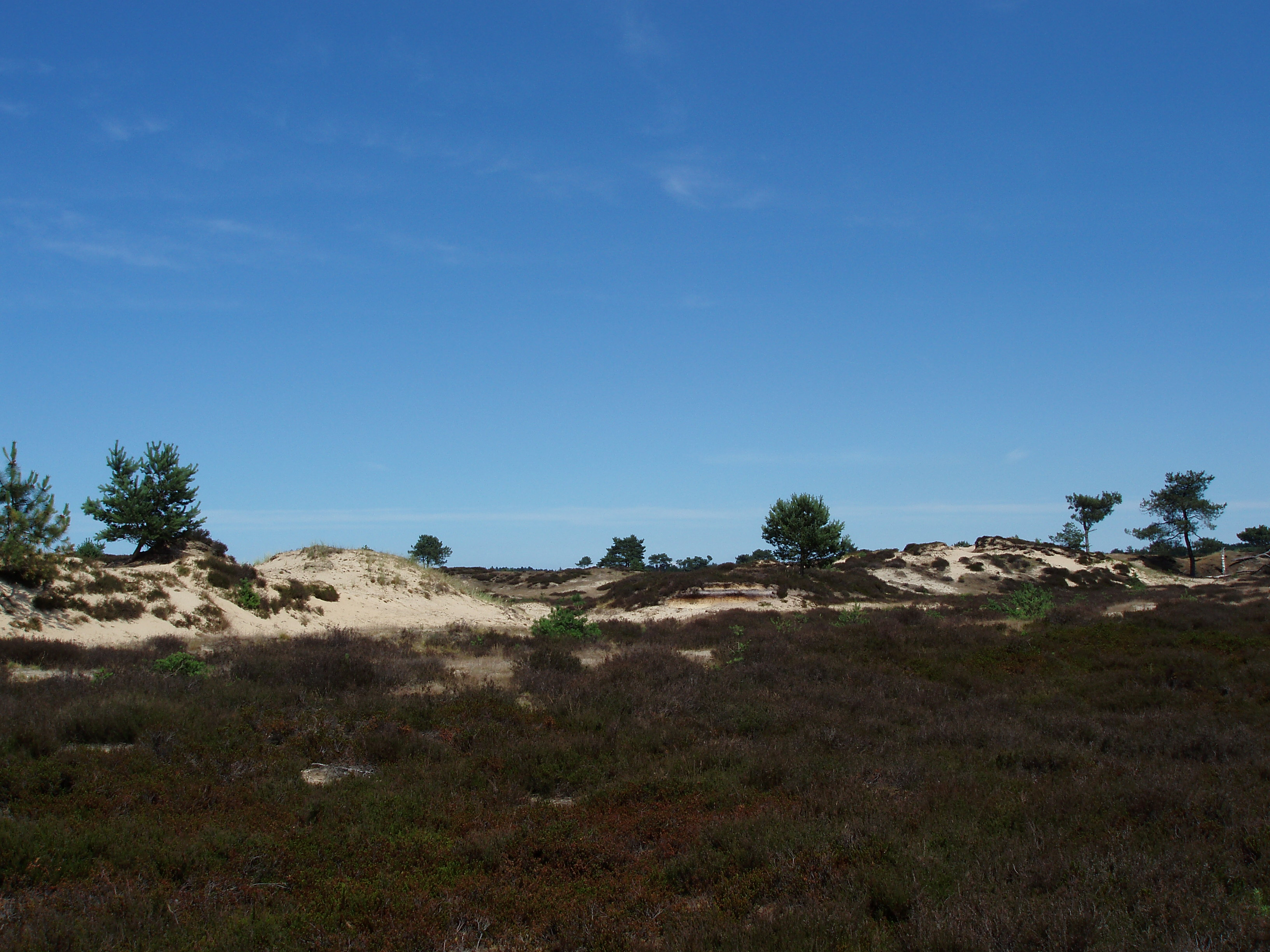 Aek(ing)erzand, Drents-Friese Wold